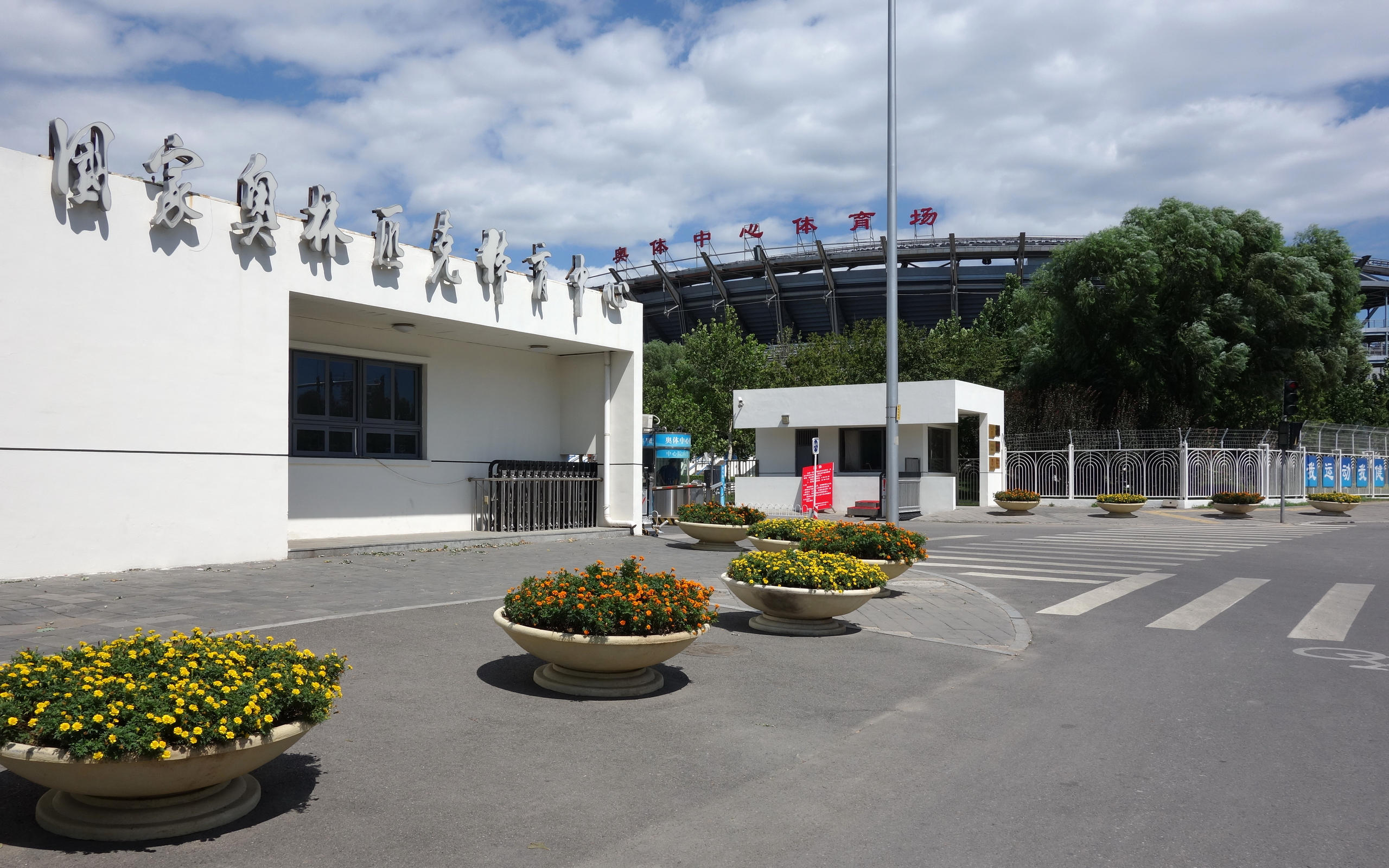 国家奥林匹克体育中心